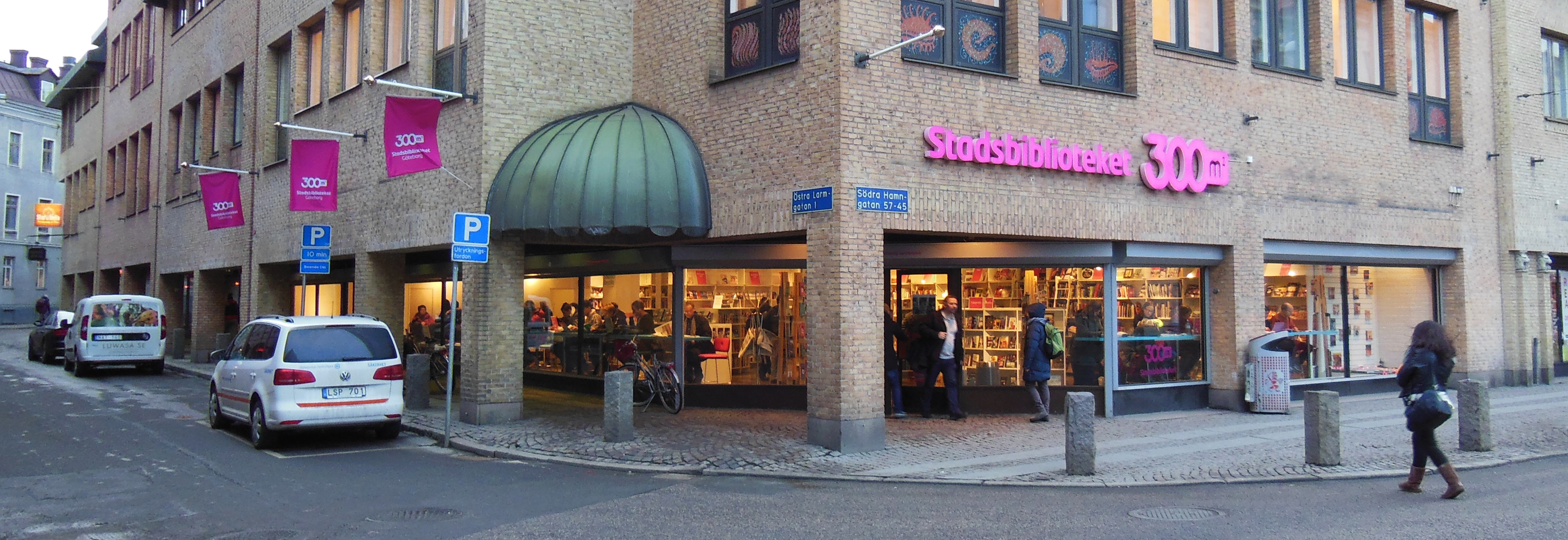 Stadsbiblioteket 300m2 i februari 2013.